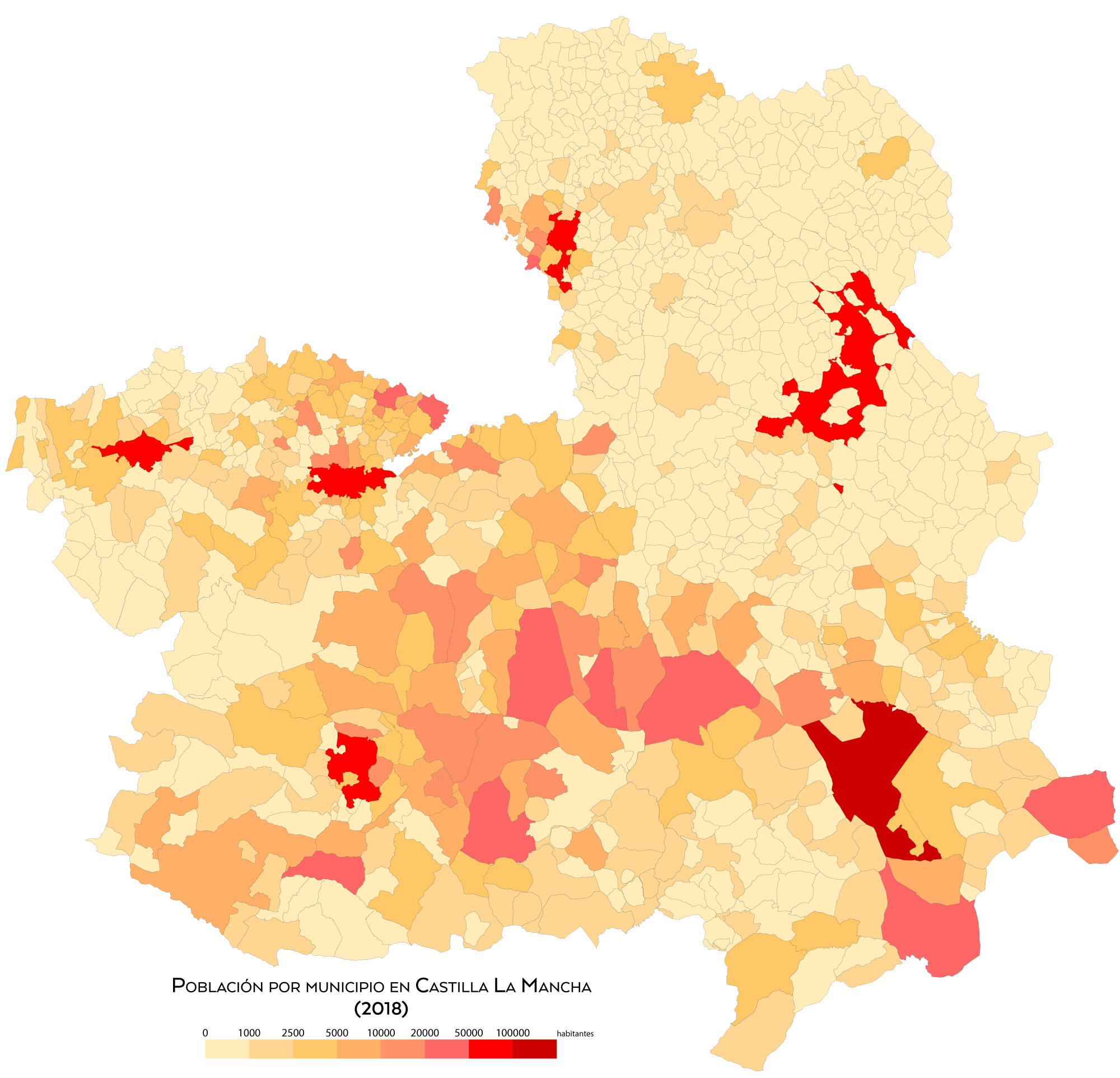 Población por municipio en Castilla La Mancha en 2018.